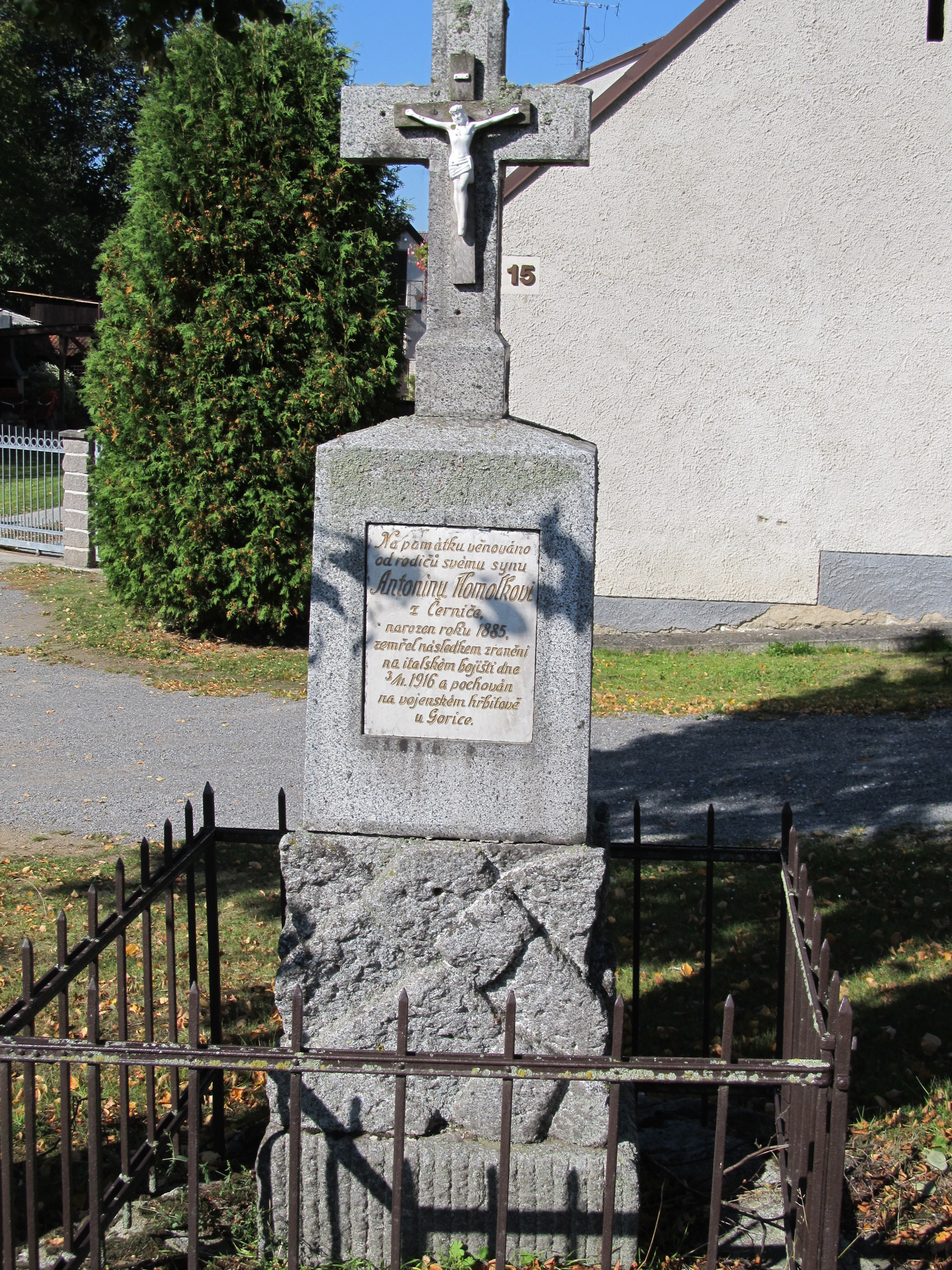 Černíč - kříž